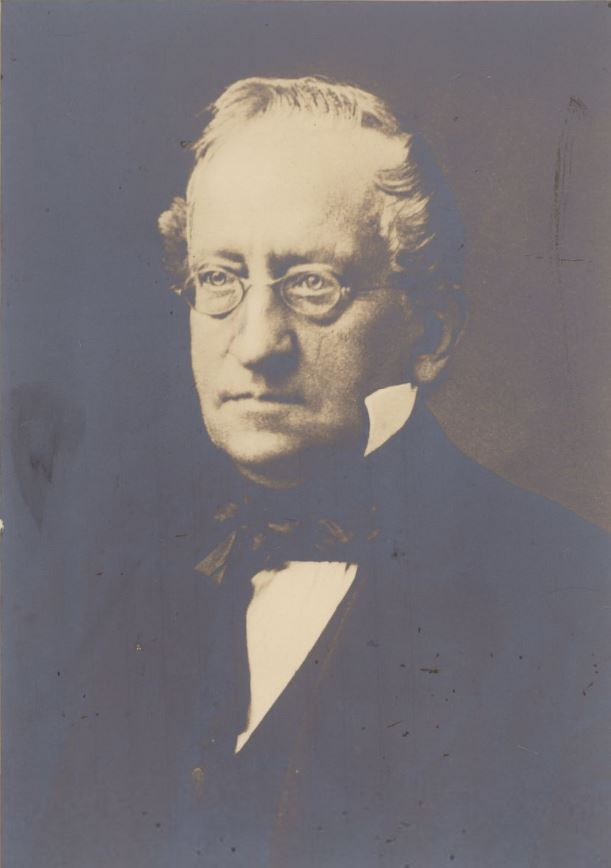 August Friedrich Karl Himly (1811-1885), deutscher Chemiker, um 1880, Fotograf: Grauk, I.U. In: Ebel, Wilhelm: Catalogus Professorum Gottingensium ; 1962; S. 123.